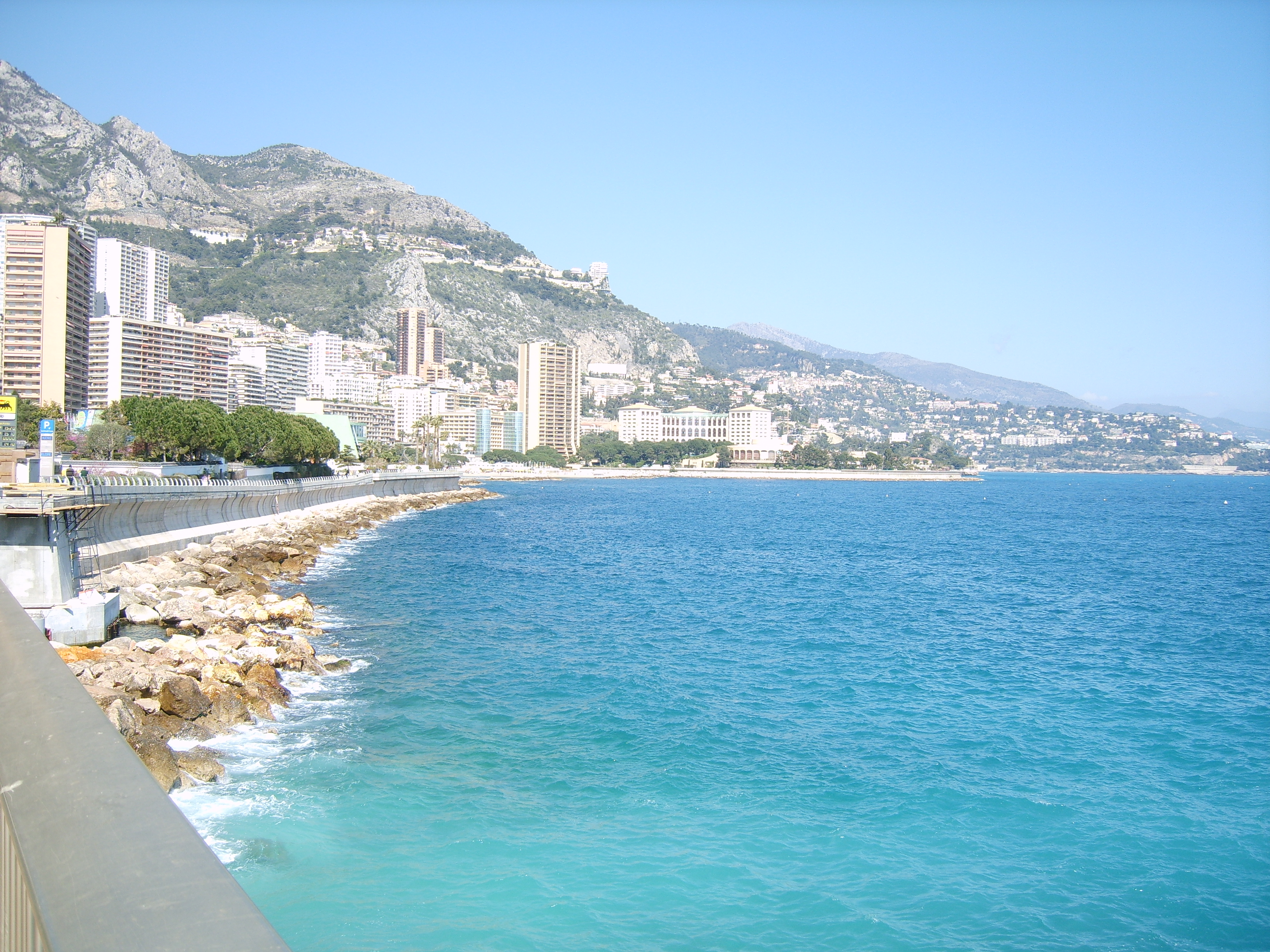 Monaco